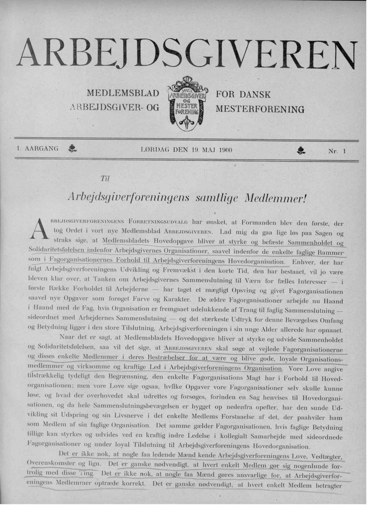 Forside af det første nr. af Arbejdsgiveren (Lørdag 19. maj 1900).